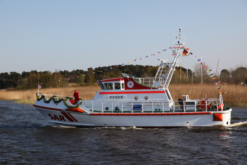 SK Eugen läuft aus dem Hafen von Freest aus